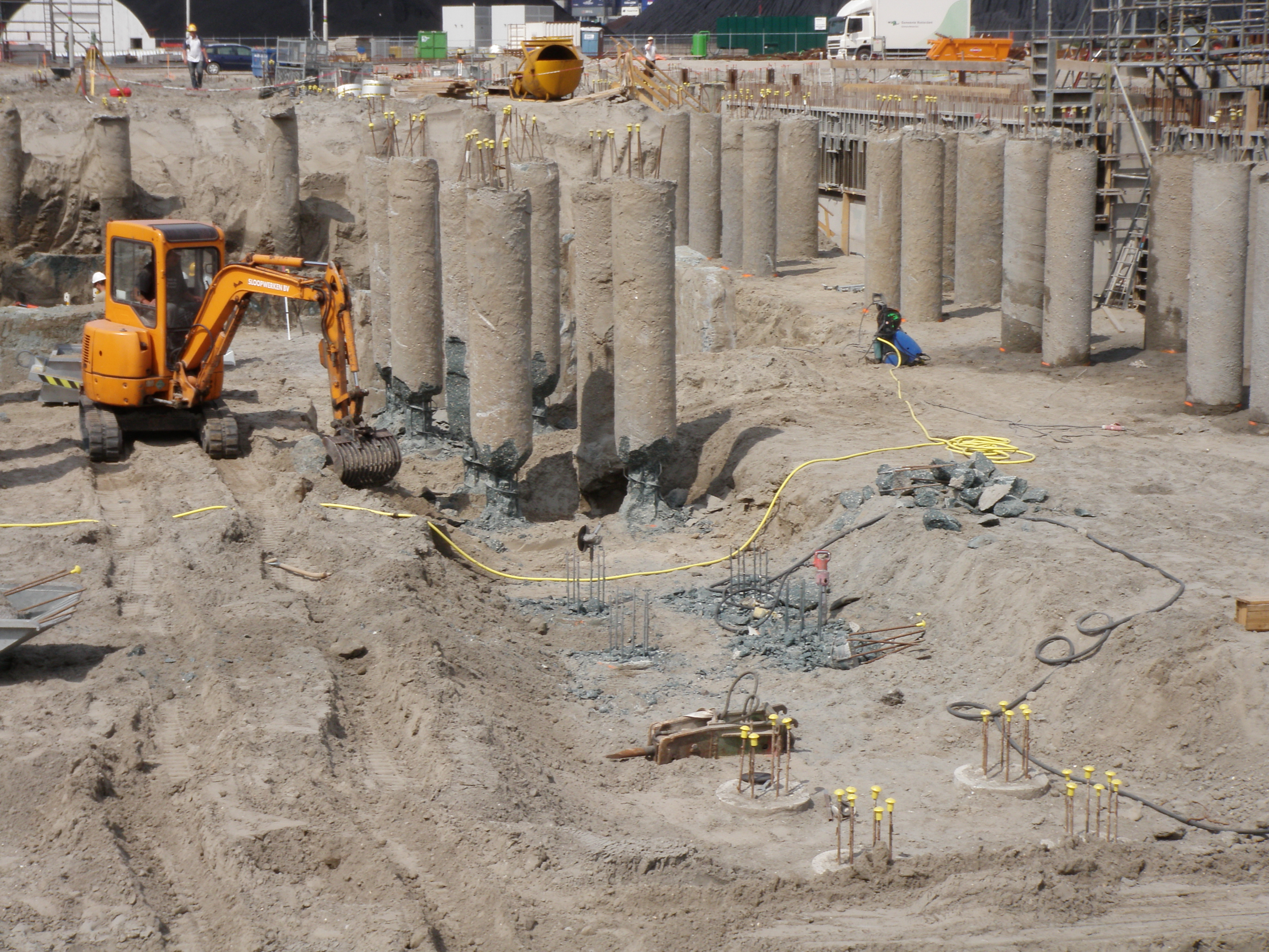 Betonbohrpfahlgruppe nach Aushub und auf Niveau Abstemmen